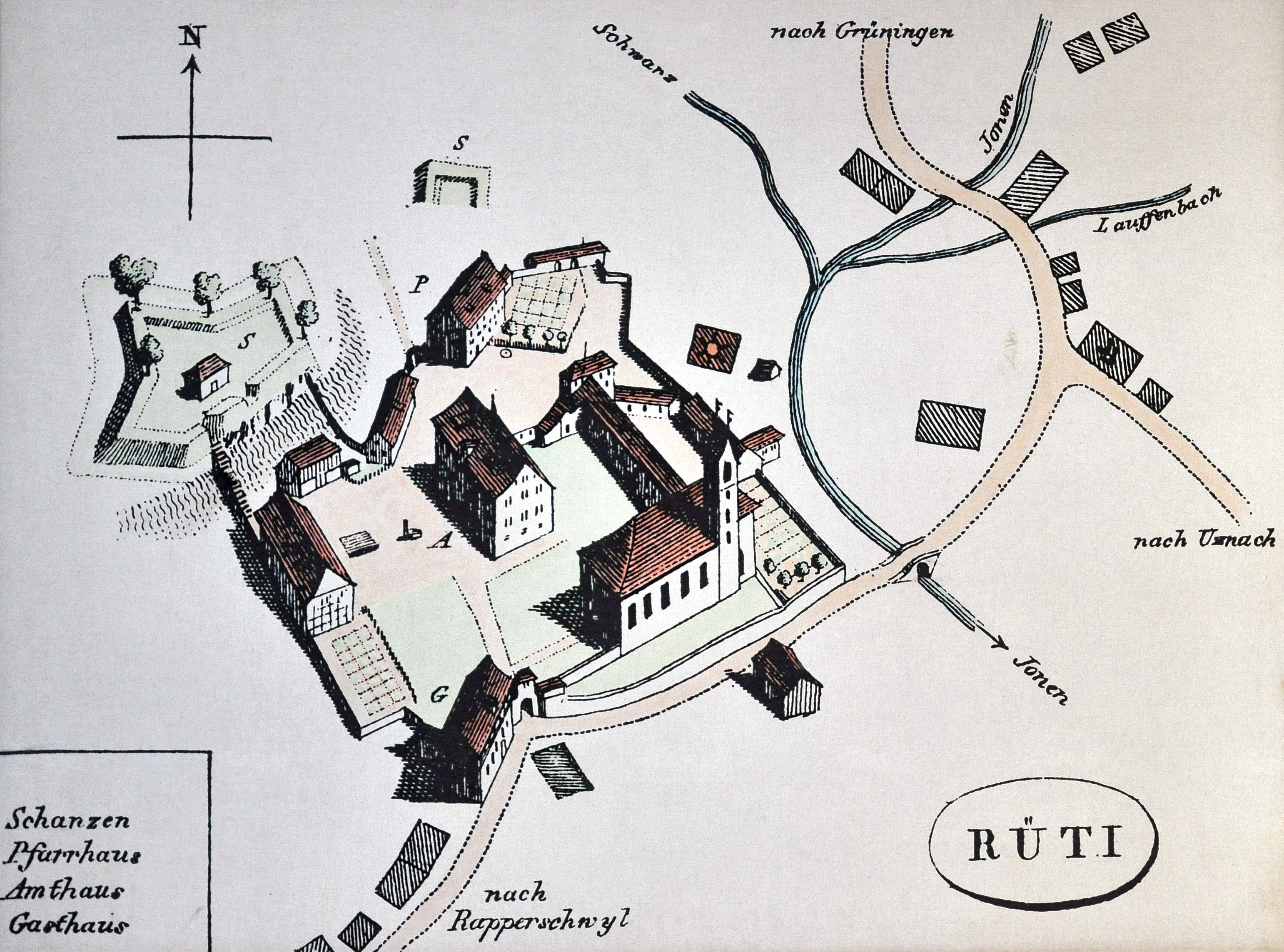 Rüti (ZH) : Kloster Rüti, Zeichnung von Henri Keller, um 1800.